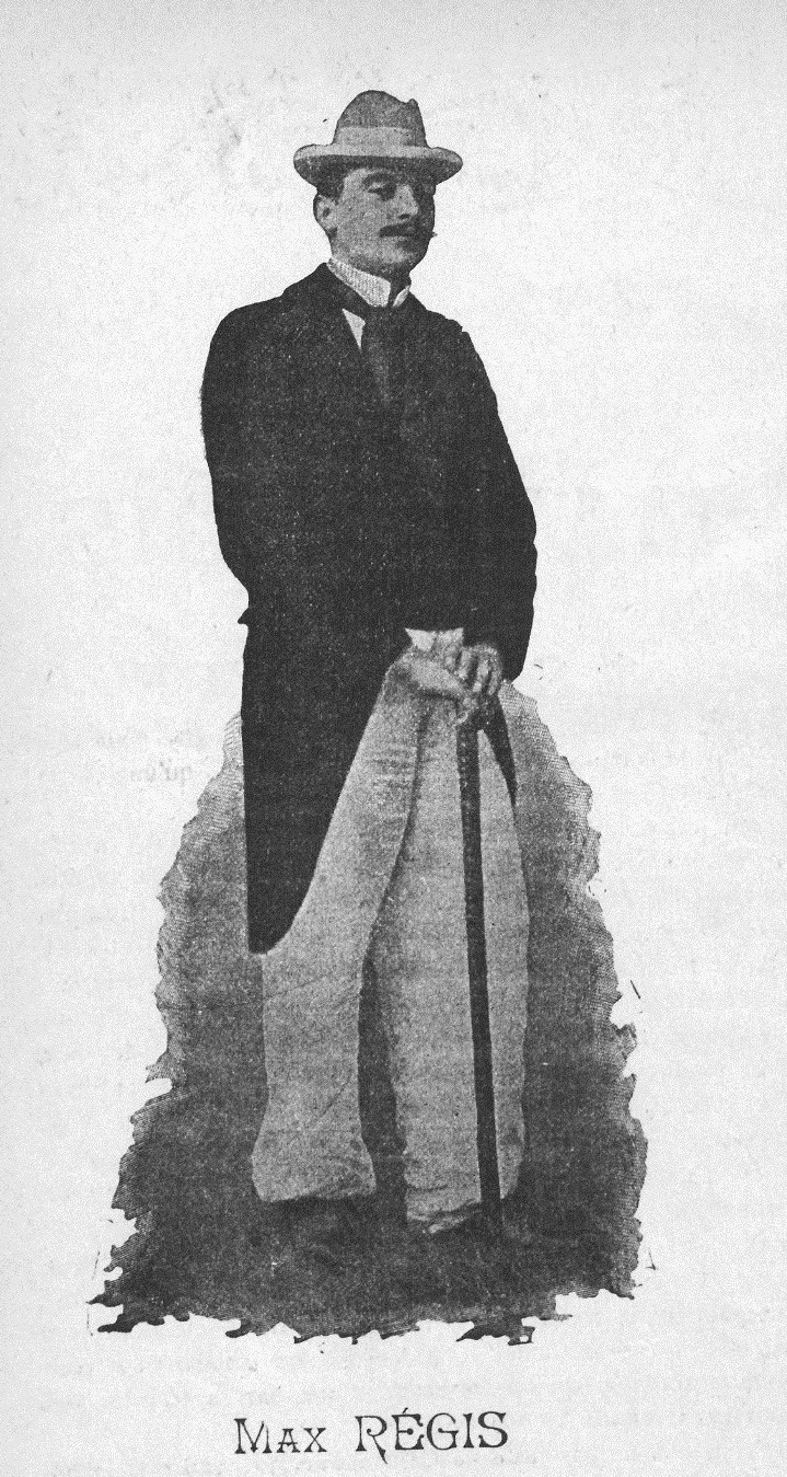 Max Régis.